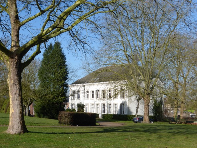 Bilzen Leroyplein zicht vanuit het park op het Edelhof